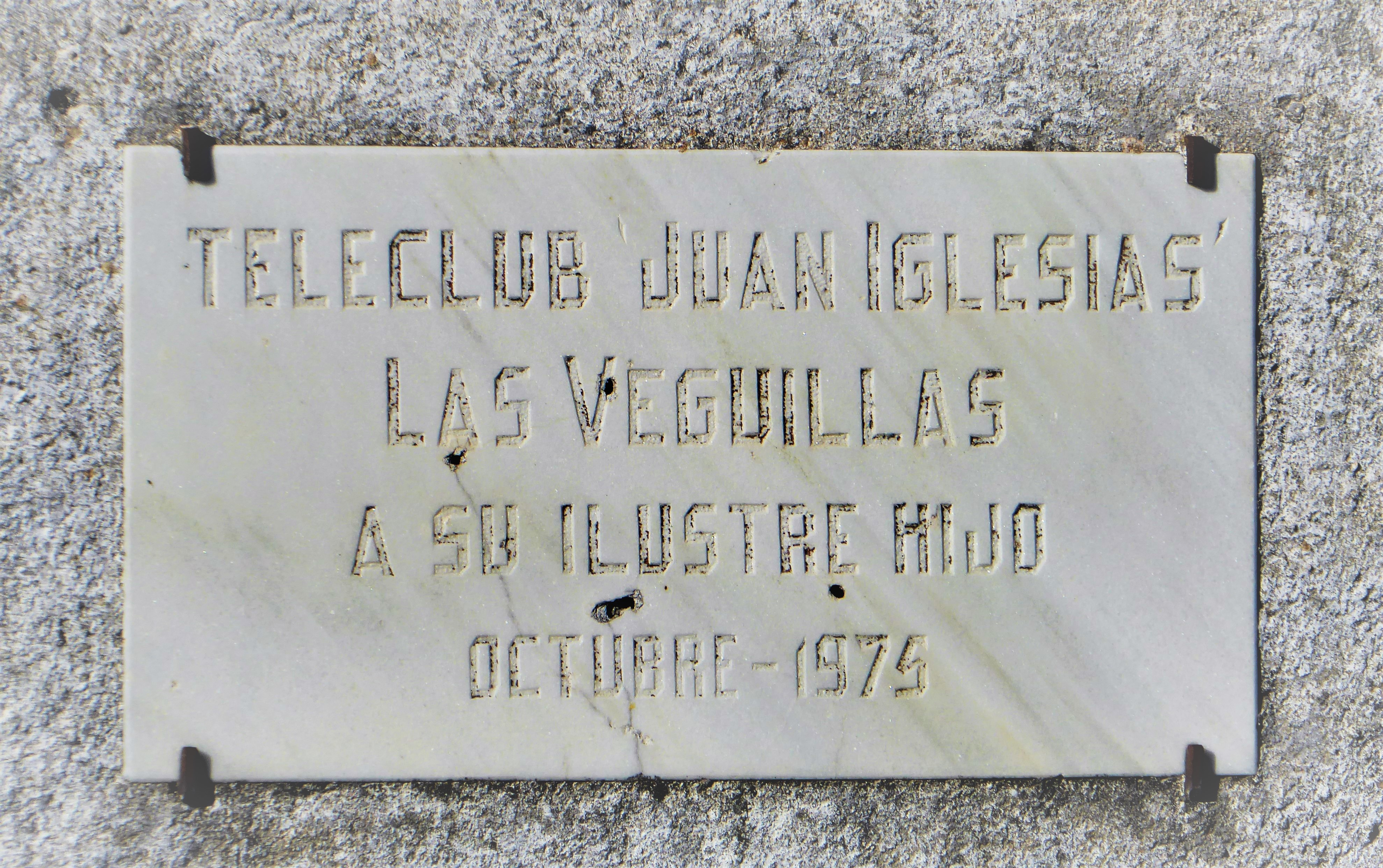 Placa conmemorativa en edificio de las Veguillas, Teleclub Juan Iglesias 1975